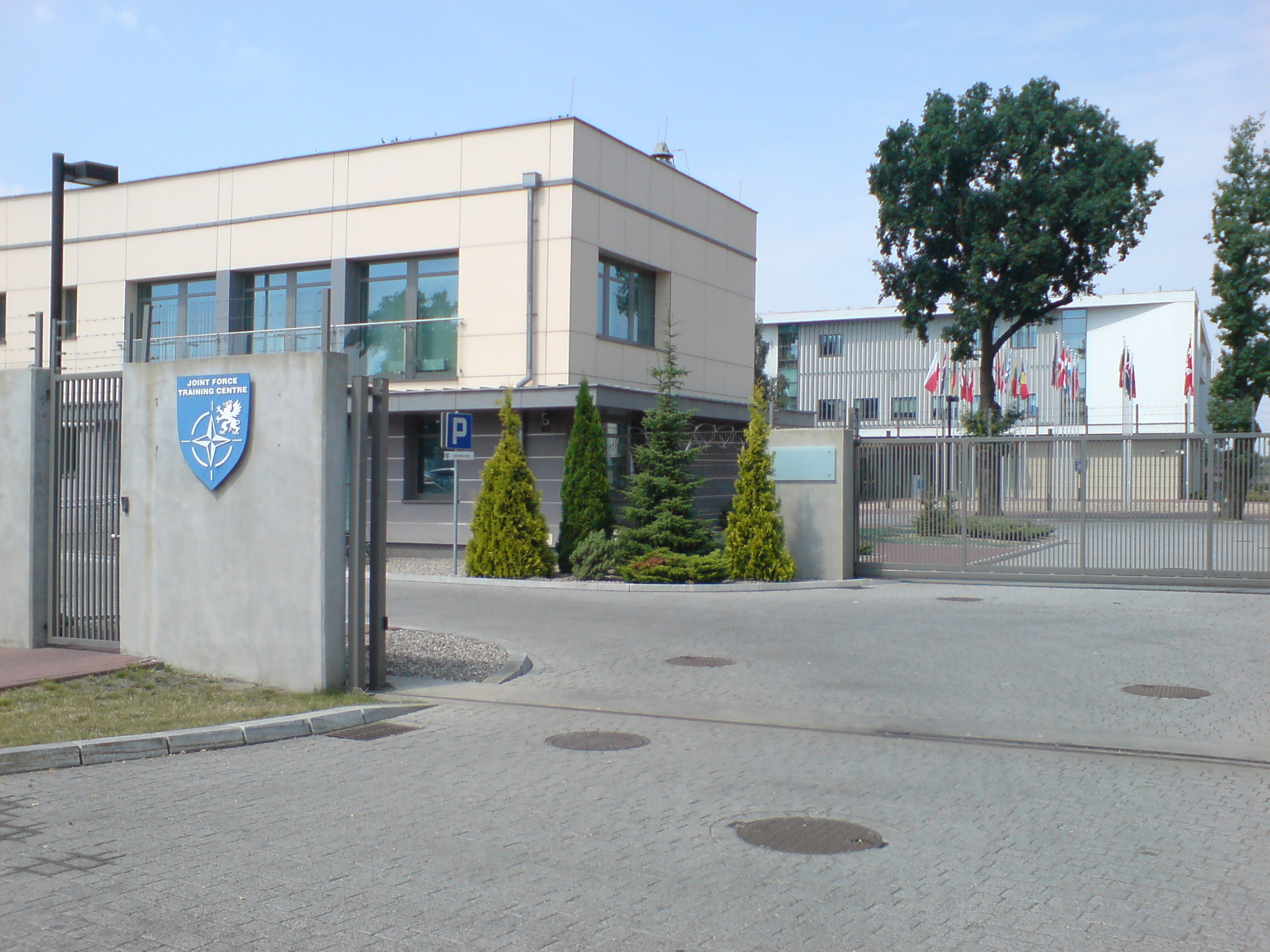 NATO Joint Force Training Center (Centrum Szkolenia Sił Połączonych) - wjazd od strony ulicy Szubińskiej